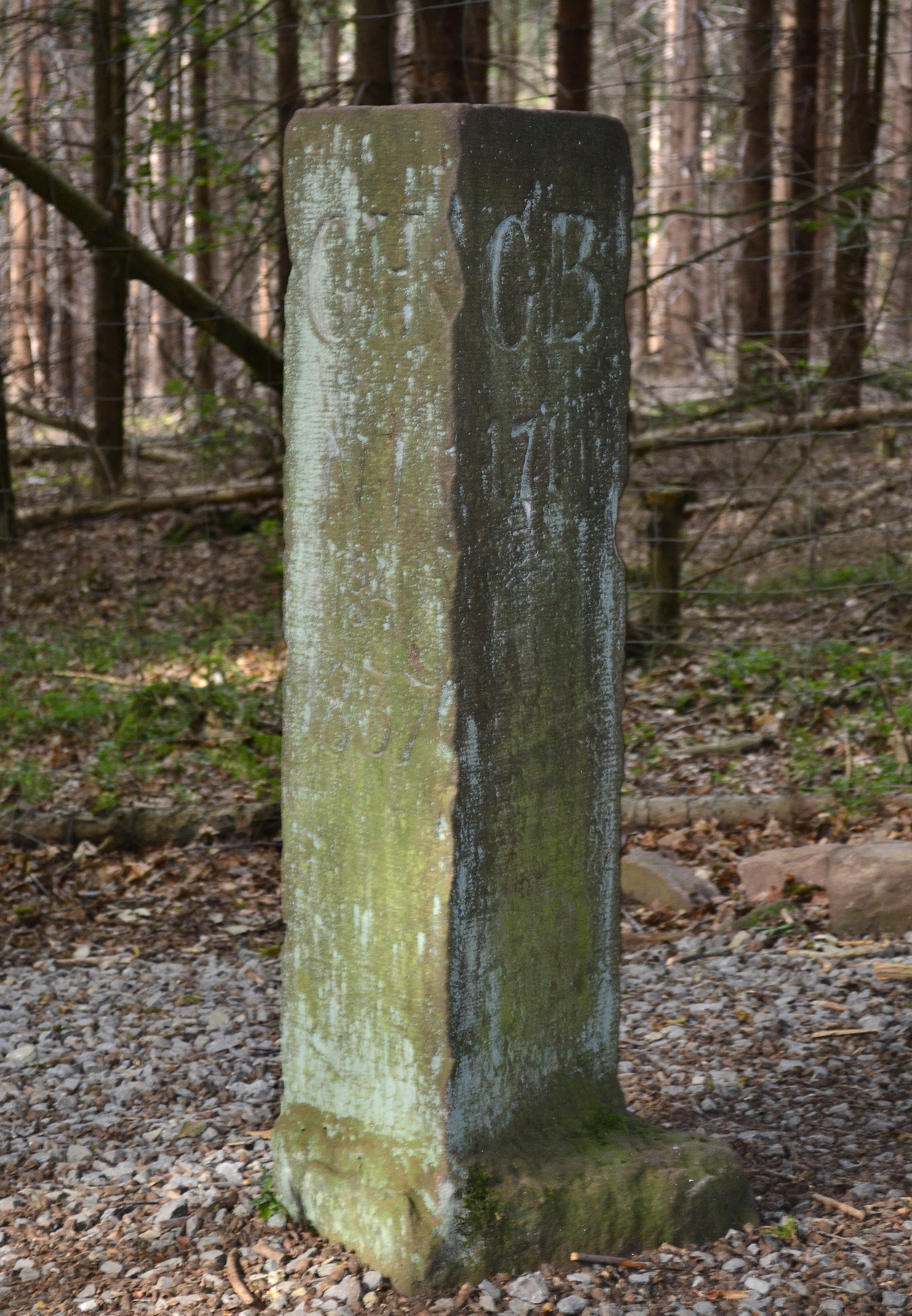 Dreiländerstein in Hesselbach; hier Seiten GH und GB